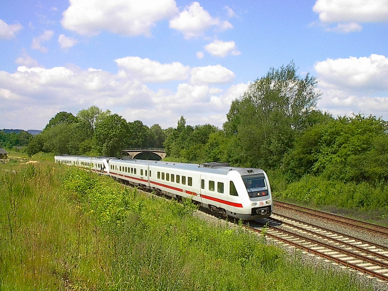 Zwei Züge der Baureihe 612 sind am 26. Juni 2004 auf der Schlömener Kurve bei Neuenmarkt als IC von Nürnberg nach Dresden unterwegs.